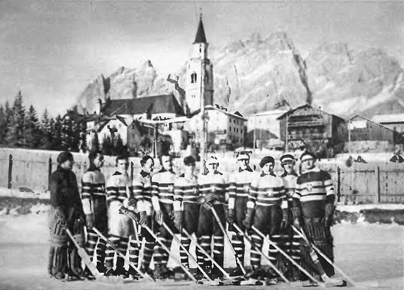 Polska reprezentacja olimpijska na zimowe igrzyska w St. Moritz 1928. Od lewej Edmund Czaplicki, Stanisław Słuczanowski, Lucjan Kulej, Kazimierz Żebrowski (wszyscy AZS Warszawa), Karol Szenajch (WKS Legia Warszawa), Aleksander Tupalski, Tadeusz Adamowski, Aleksander Kowalski, Włodzimierz Krygier (wszyscy AZS Warszawa), Stanisław Pastecki (WKS Legia Warszawa), Józef Stogowski (TKS).